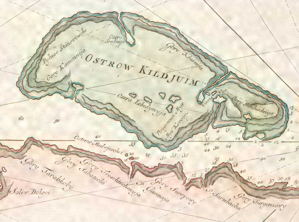 Карта Кильдина Van Keulen Atlas "van de River van Kola"